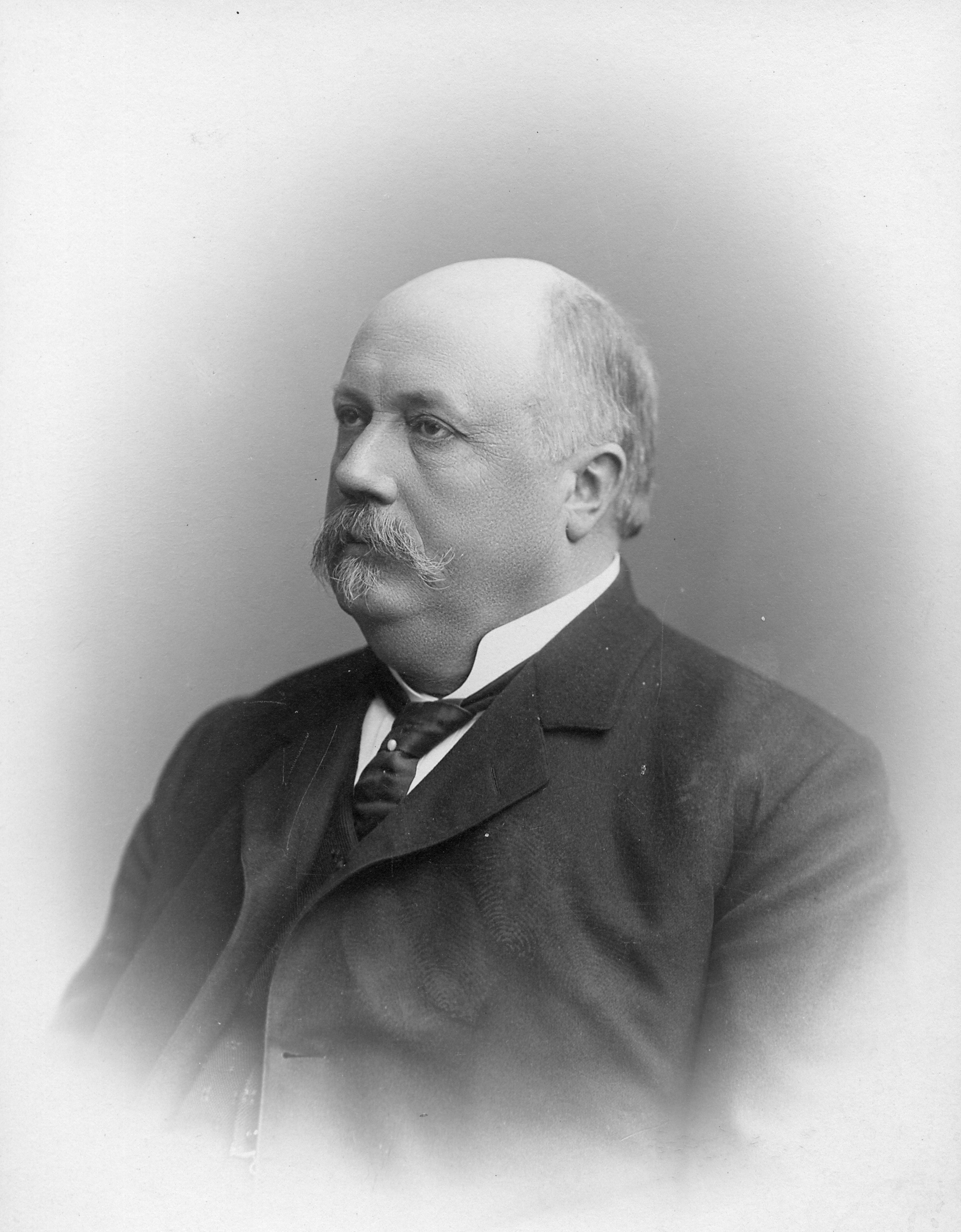 Theodor Nordström (1843-1920), finlandssvensk geolog och riksdagsman. Generaldirektör för Statens Järnvägar 1897-1904 och landshövding i Örebro län 1904-1911.